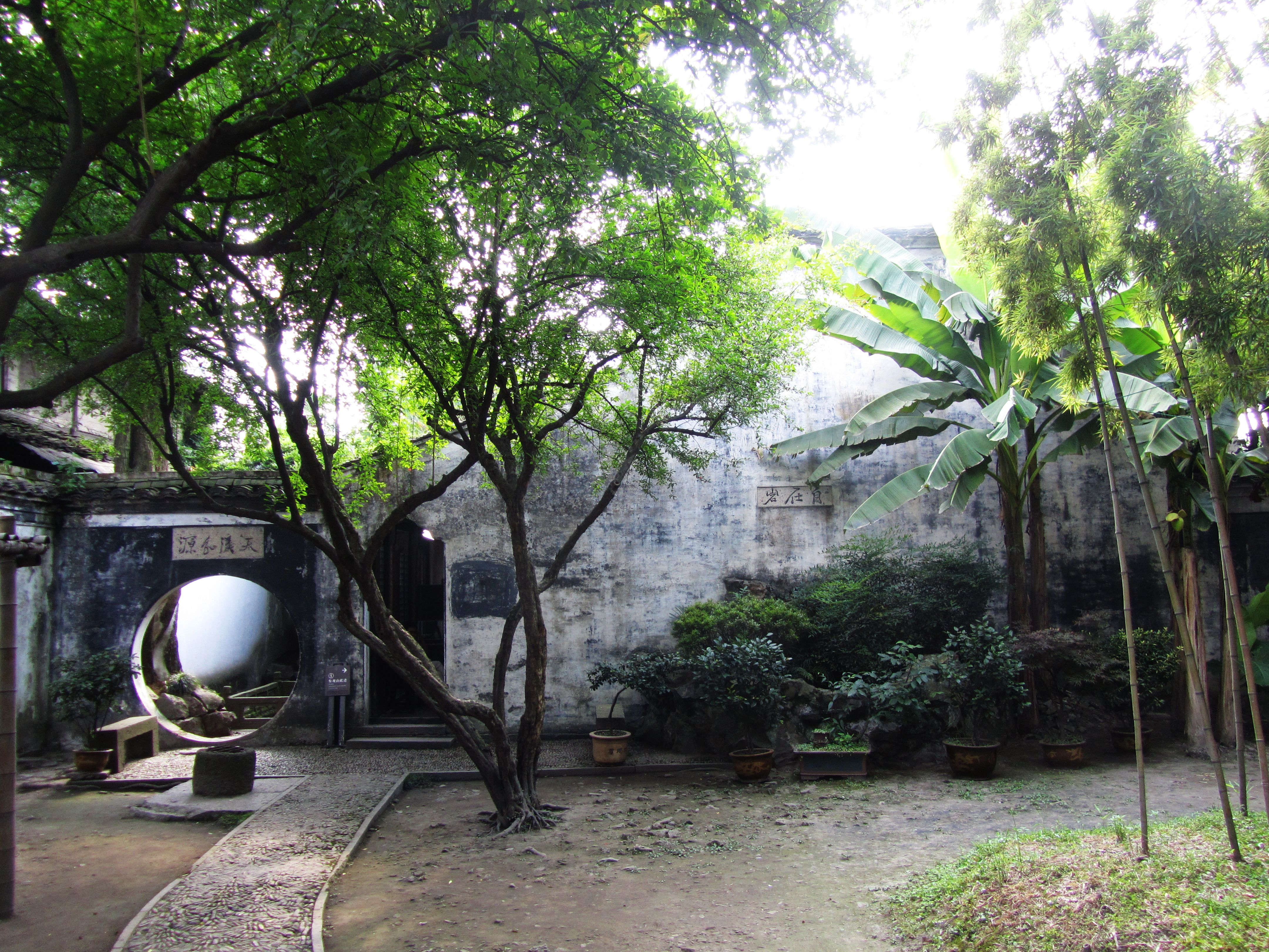 绍兴青藤书屋，入门所见的庭院和建筑侧面。